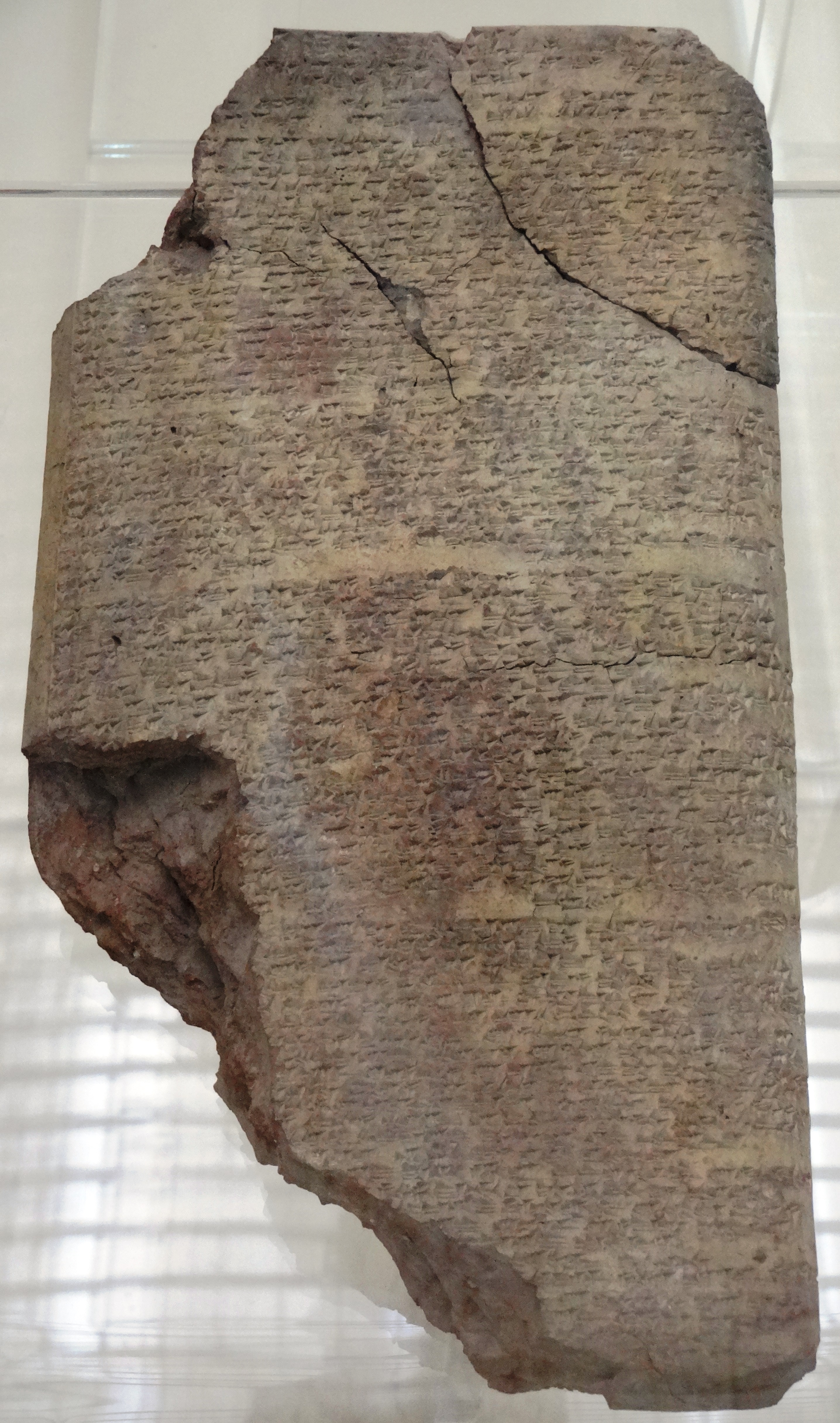 Schreiben von Hattuschili III. an Kadaschman-Enlil II. über ein gemeinsames Vorgehen gegen Ägypten, Archäologisches Museum Istanbul, Inv.Bo. 1802 CBA (KBo I 10)